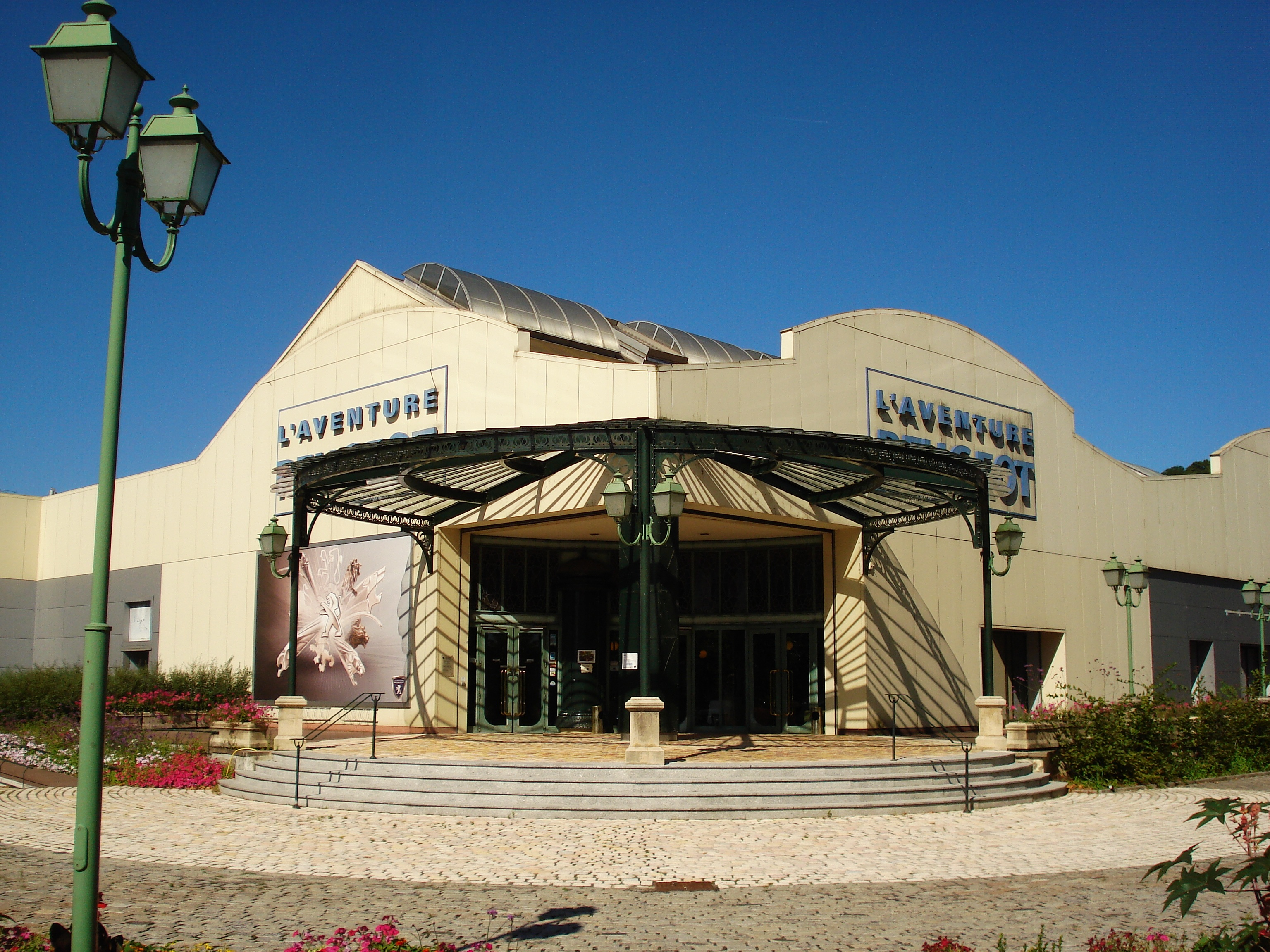 Entrée du musée